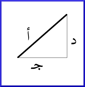 رسم الضلع أ بالوصل بين الضلع د و ج